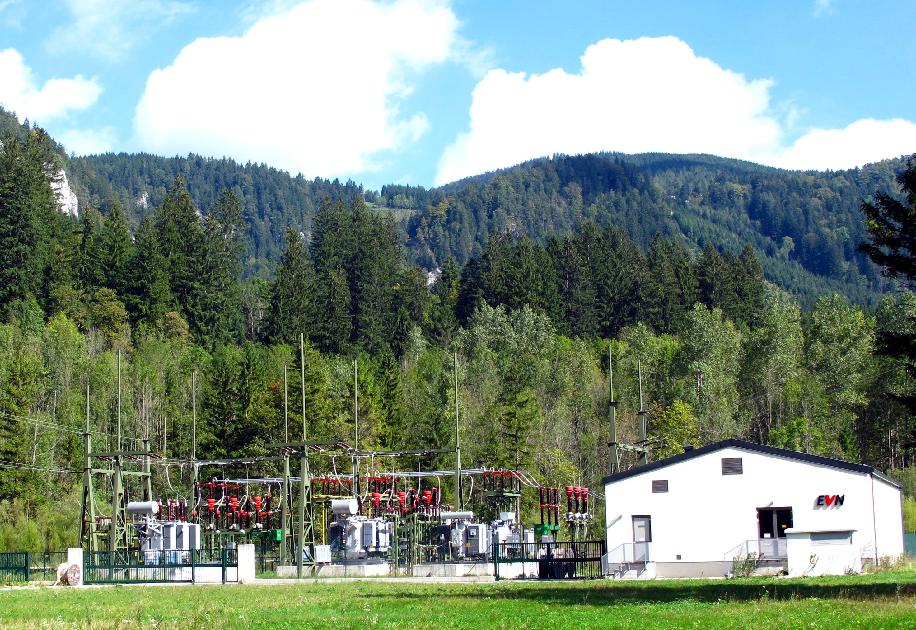 110-kV-Freiluftschaltanlage und Umspanner am Areal des Wasserkraftwerks Erlaufboden